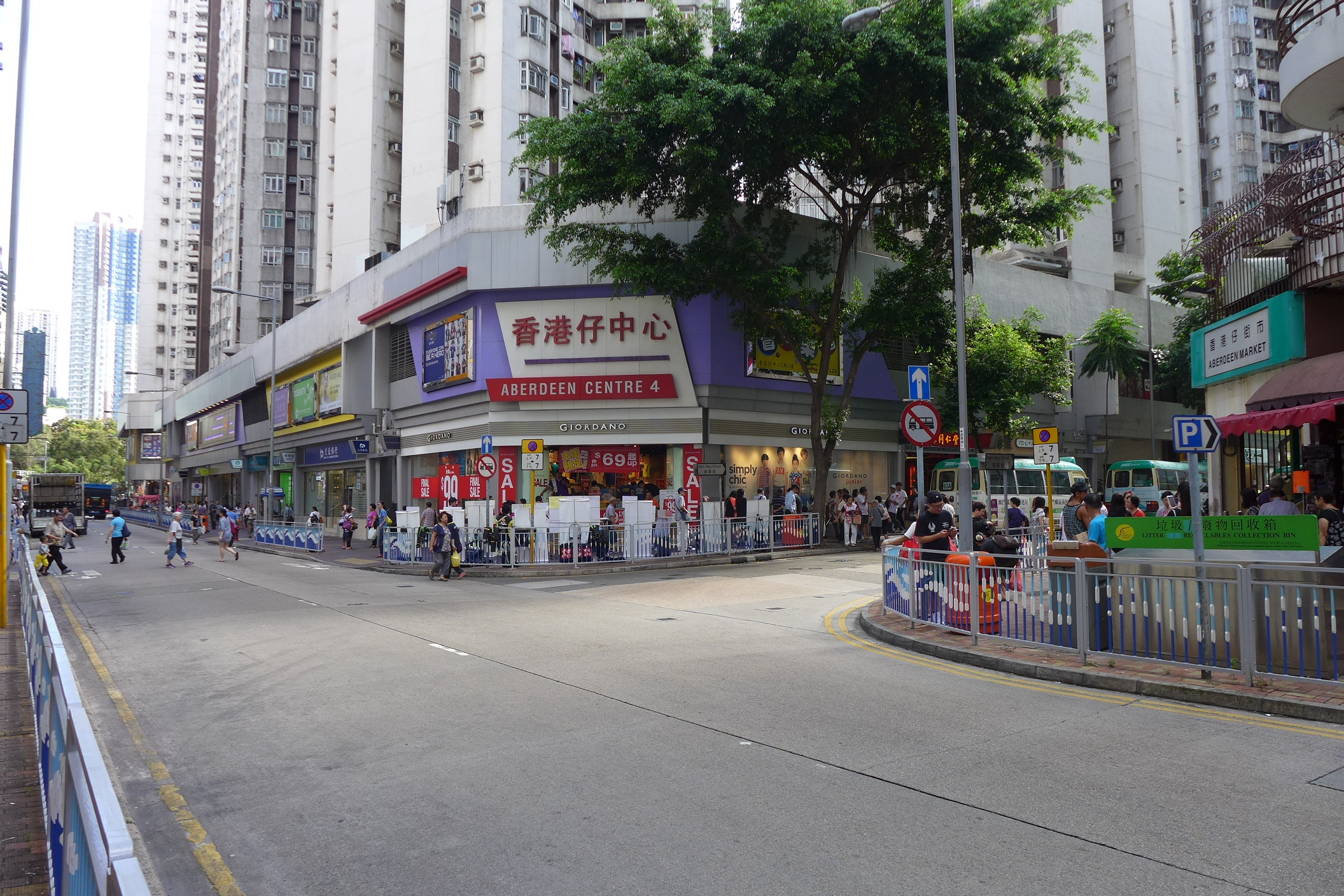 Aberdeen Centre Ac4 Outside view